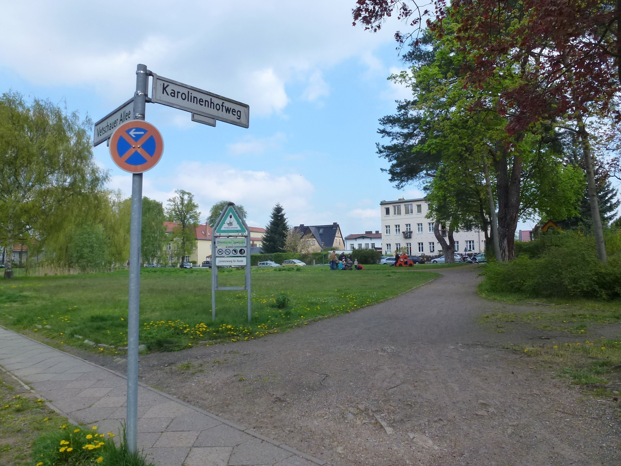 Berlin-Schmöckwitz Karolinenhofweg Spielplatz